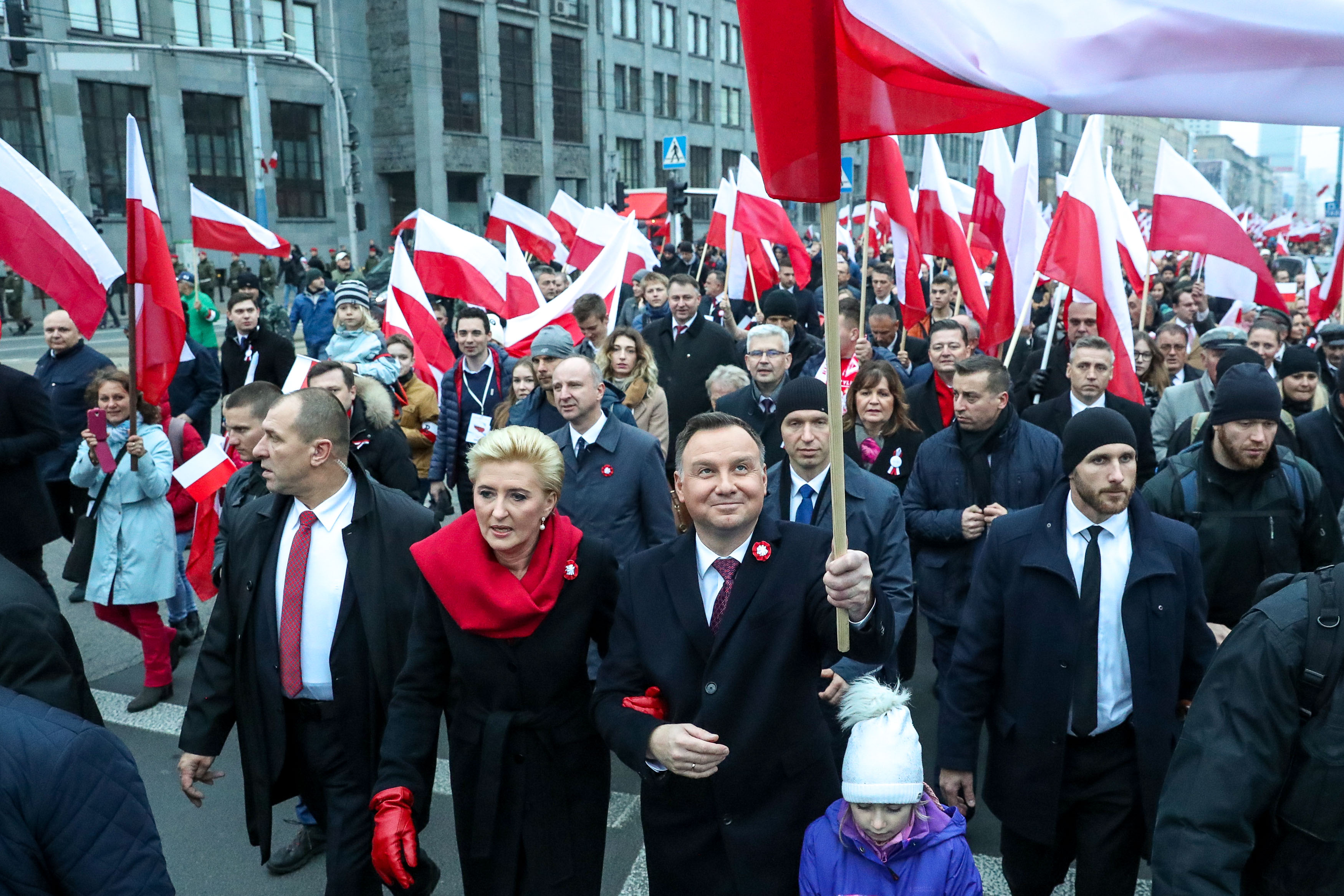 11/11/2018 Obchody 100. rocznicy odzyskania niepodległości Rzeczypospolitej Polskiej. Marsz „Dla Ciebie Polsko”. Fot. Grzegorz Jakubowski